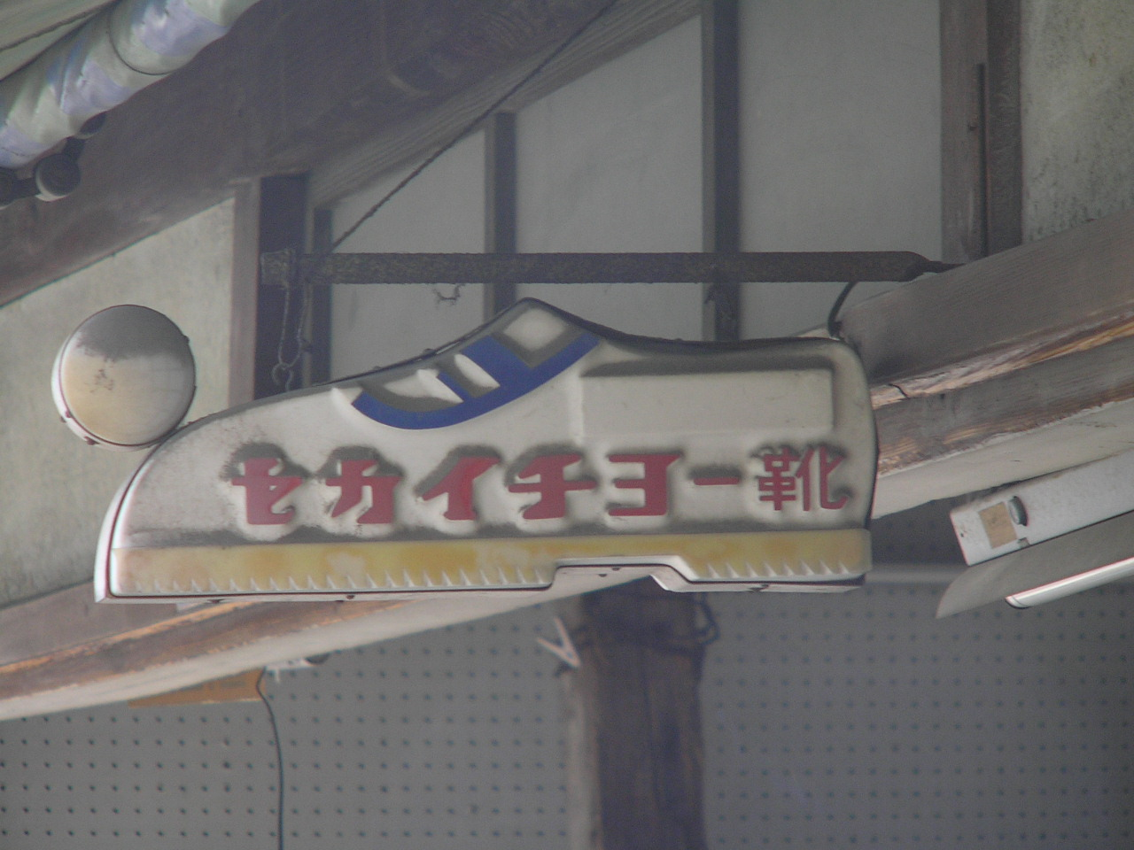 世界長レトロ看板